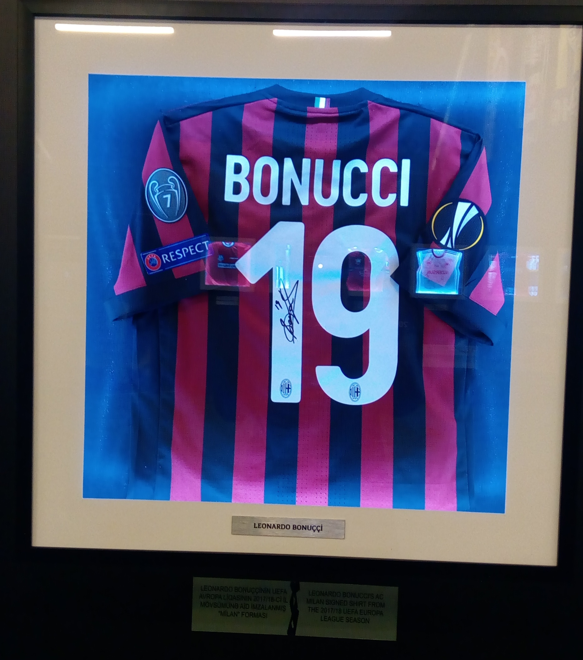 Avropa Liqası Muzeyi Bakıda